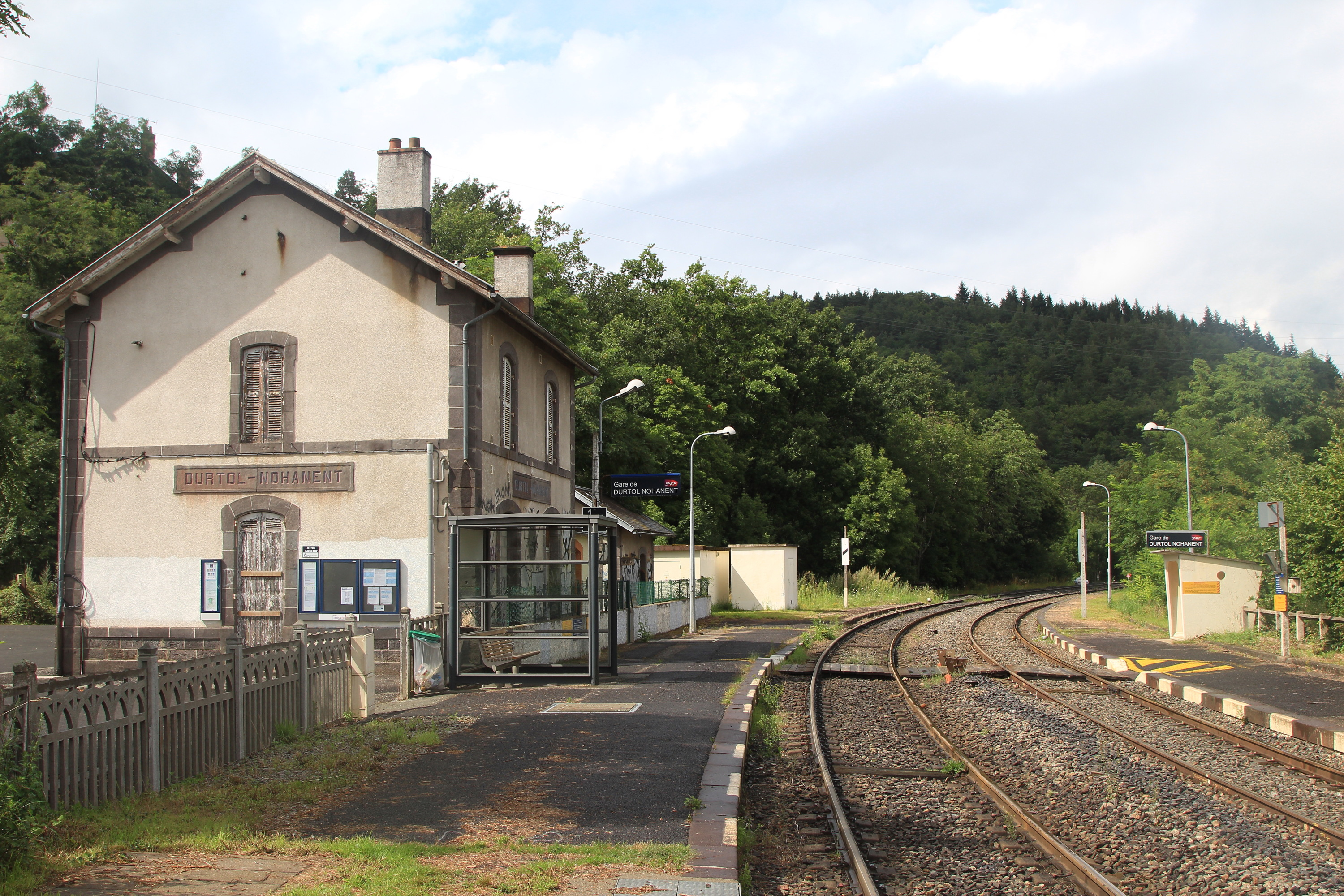 Vue générale des quais de la gare de Durtol - Nohanent.